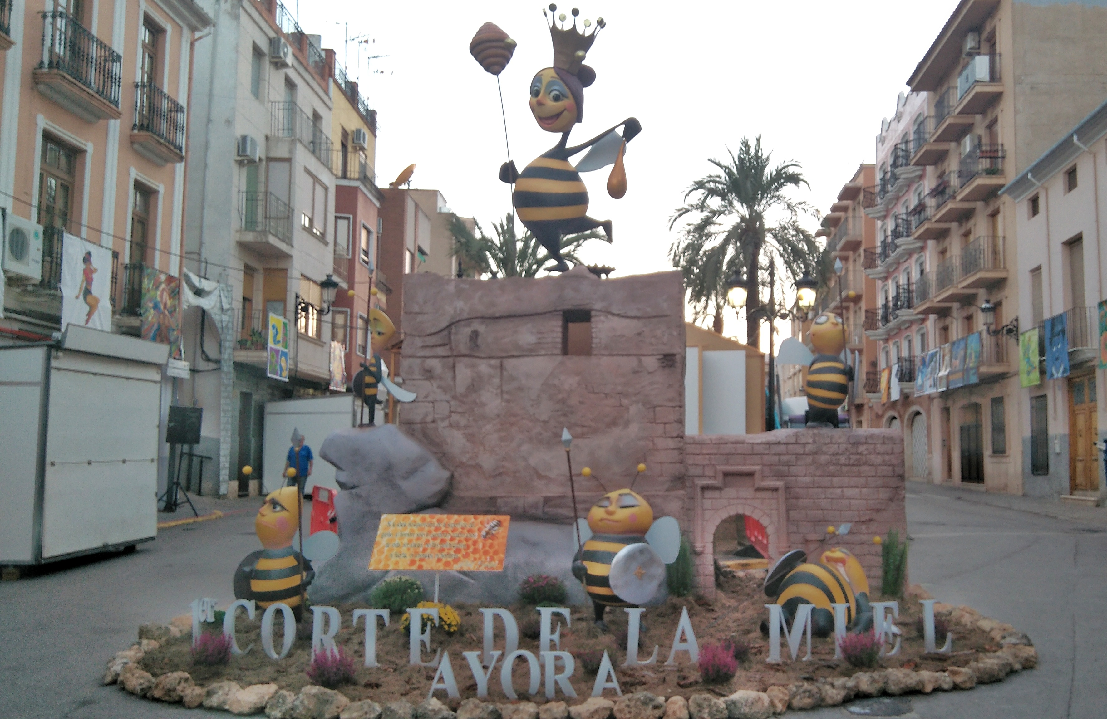 El Primer Corte de la Miel de Ayora - XVI edición Falla plantada junto a la fuente de la negrita